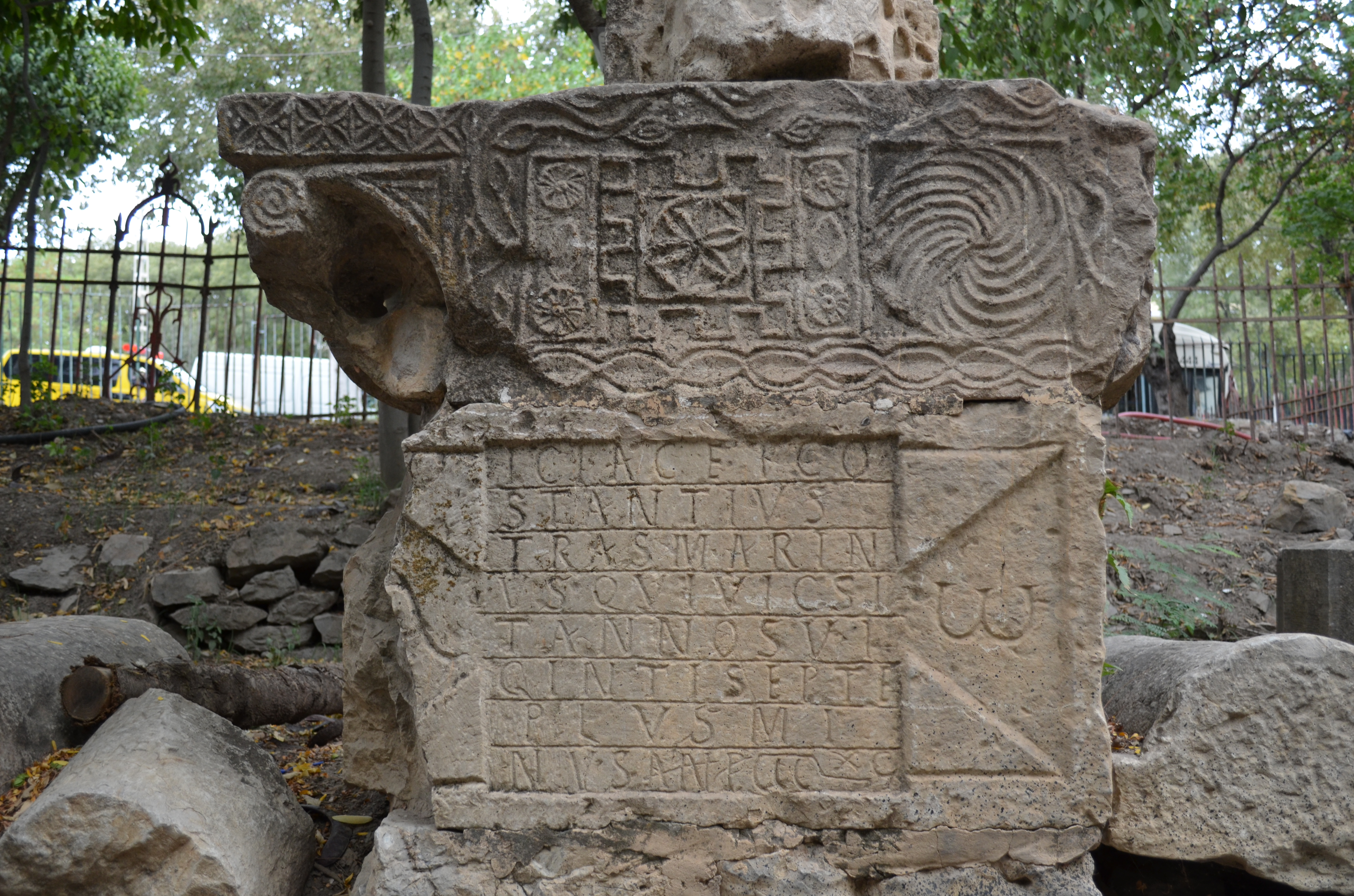 Stèle funéraire romaine au jardin Emir Abdelkader (anciennement Jardin d'Orléans) à Sétif, Algérie, comportant l'inscription (H)ic iacet Co(n)/stantius / tra(n)smarin/us qui vicsi/t annos vi/ginti septe(m) / plus mi/nus an(no) p(rovinciae) CCCLXVI CIL VIII, 8639